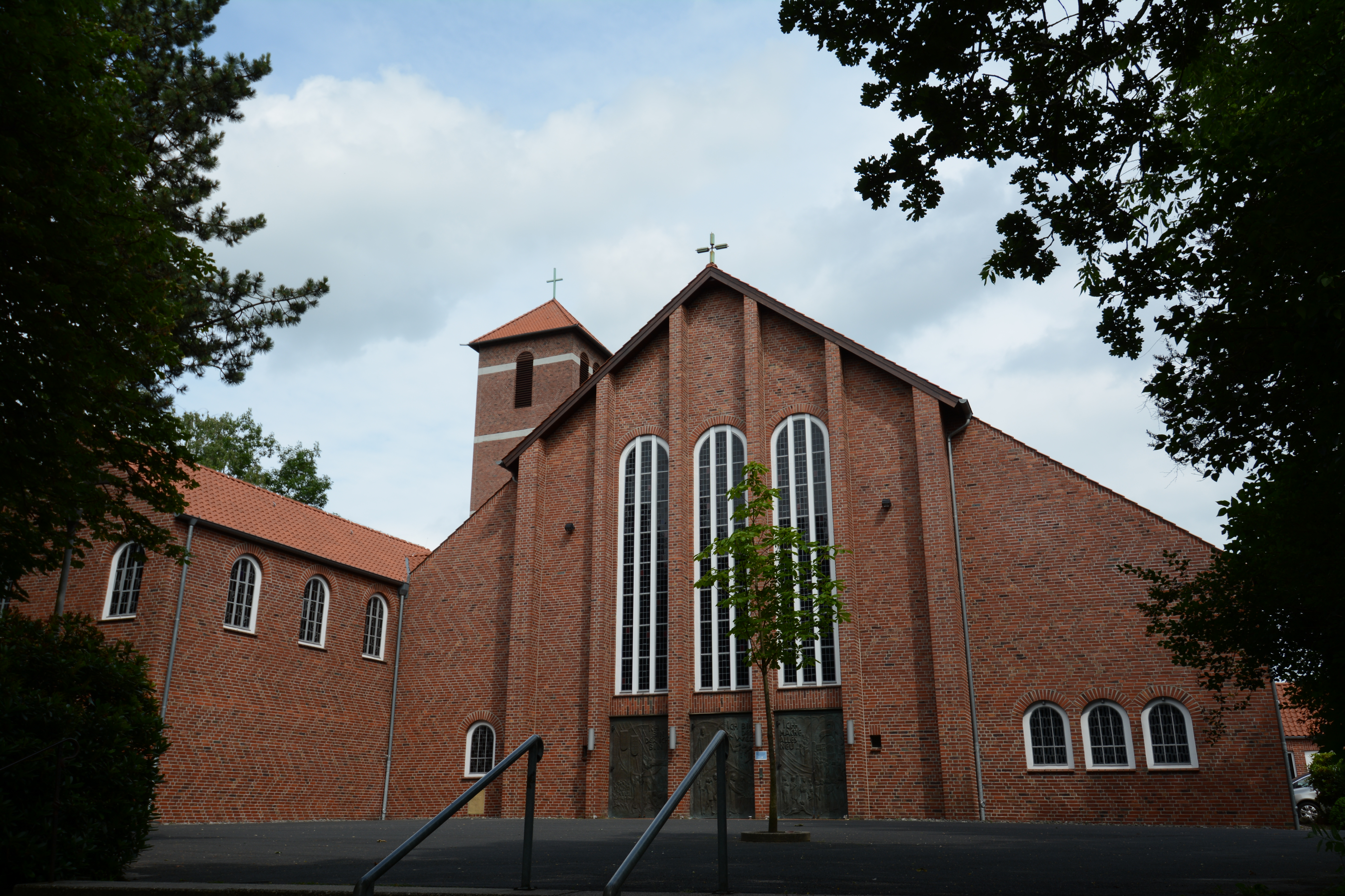 Die Pfarrkirche Maria Königin in Lingen (Ems). Blick auf das Westportal. Im Hintergrund der Turm, im Vordergrund links die angebaute Marienkapelle.